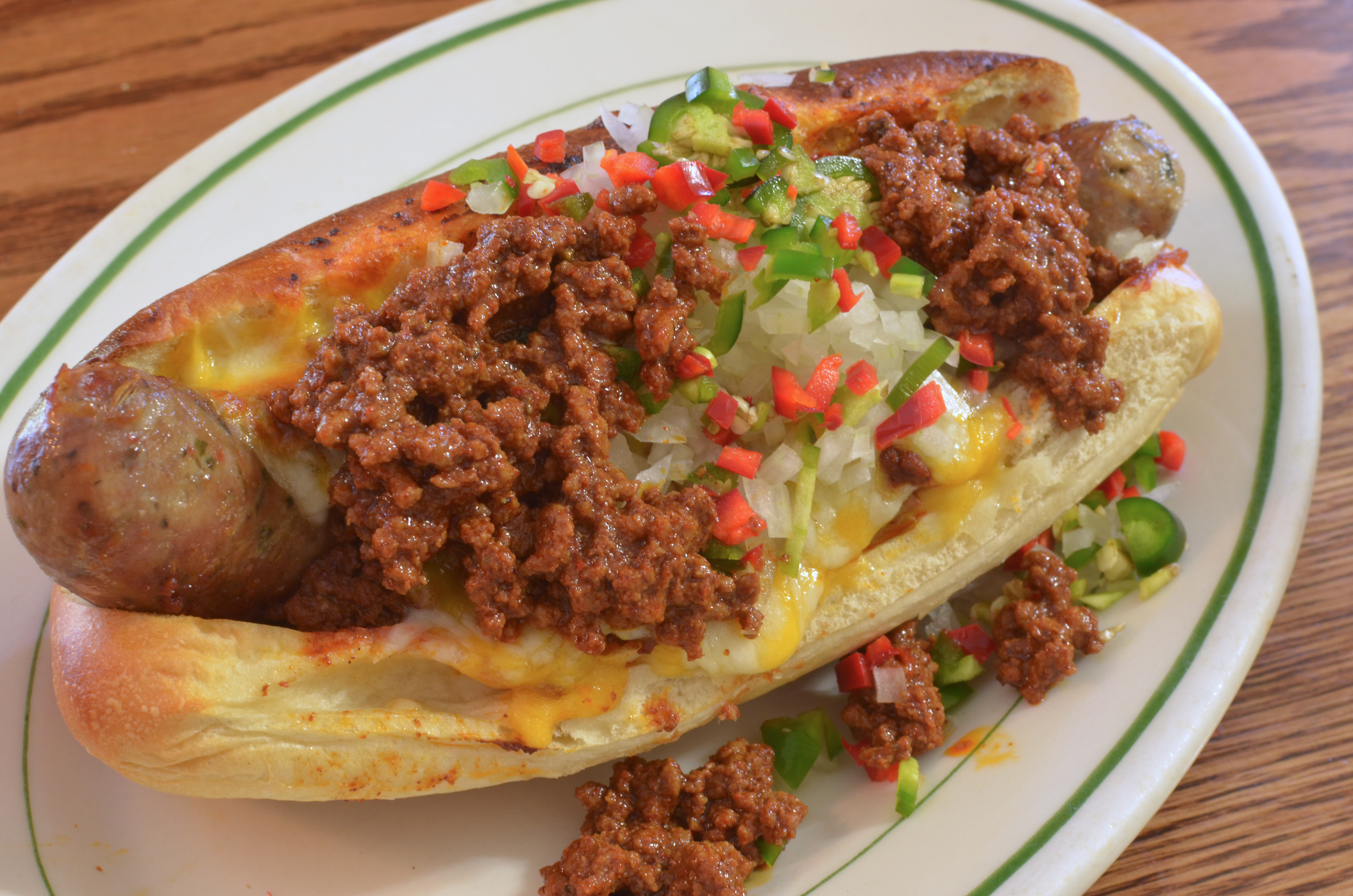 Mmm... chili cheese sausage dog